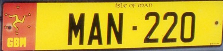 kentekenplaat Isle of Man